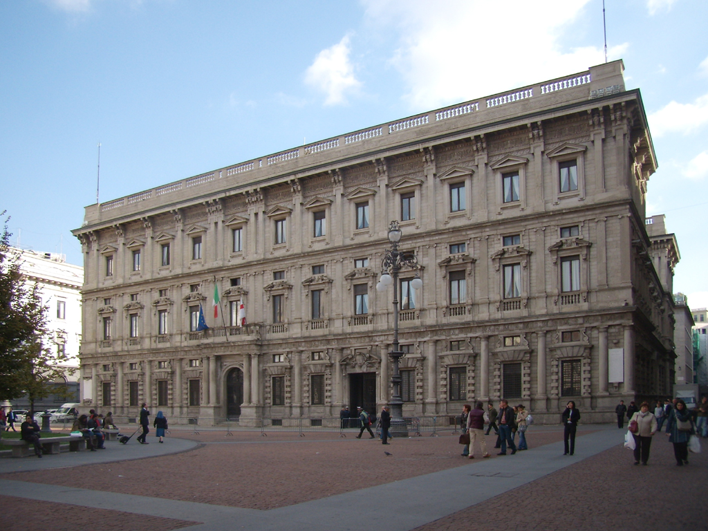 Palazzo Marino a Milano, facciata su piazza della Scala